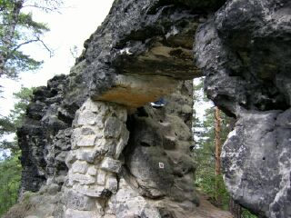 Kleines Prebischtor Böhmische Schweiz